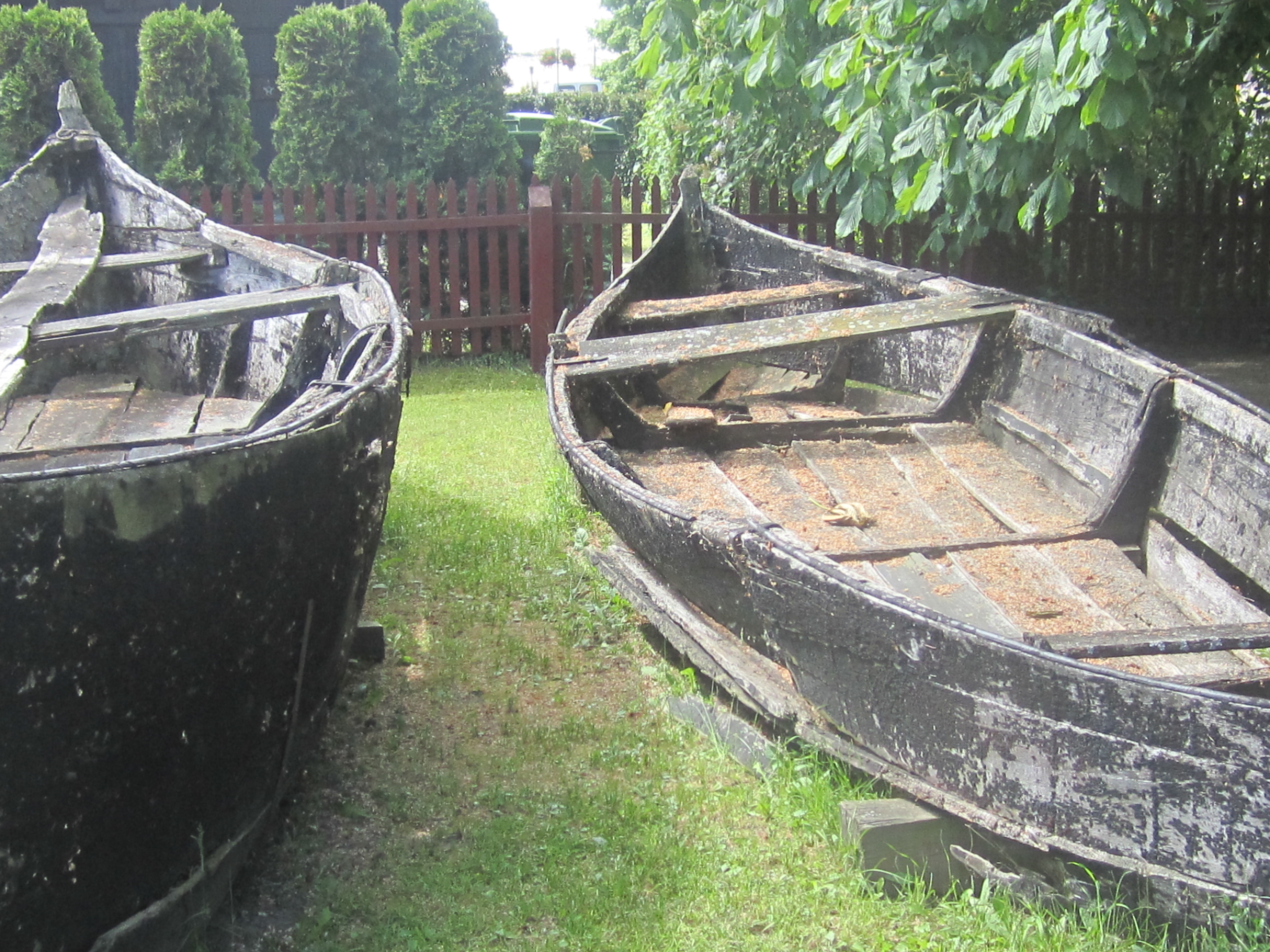 Nida, Lietuva